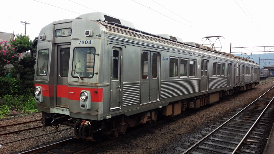 新金谷駅側線に留置中の7200系、中央扉のすぐ左にある窓に、行き先表示サボ（デザインは前面方向幕と同一）を差し込めるようになっている。 （2016/08/18 撮影）